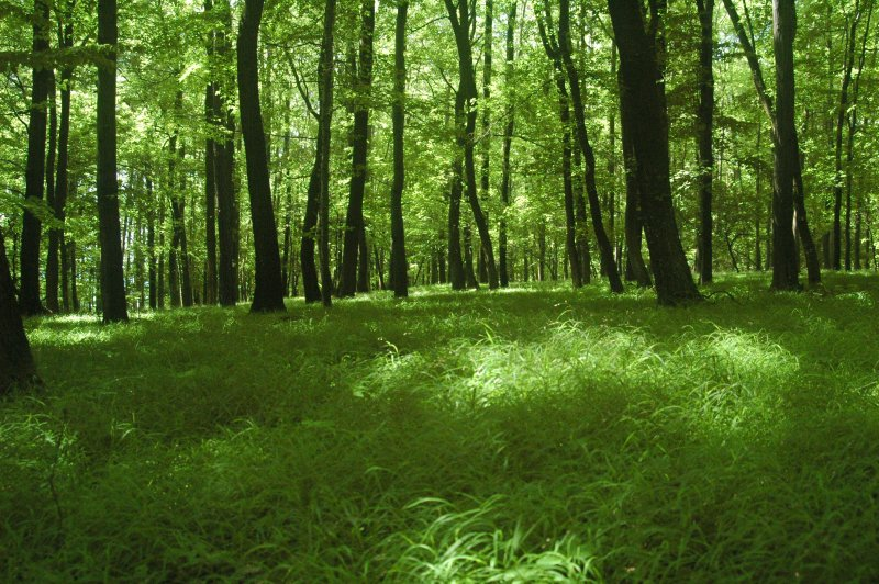 Zámčisko, young beech forest